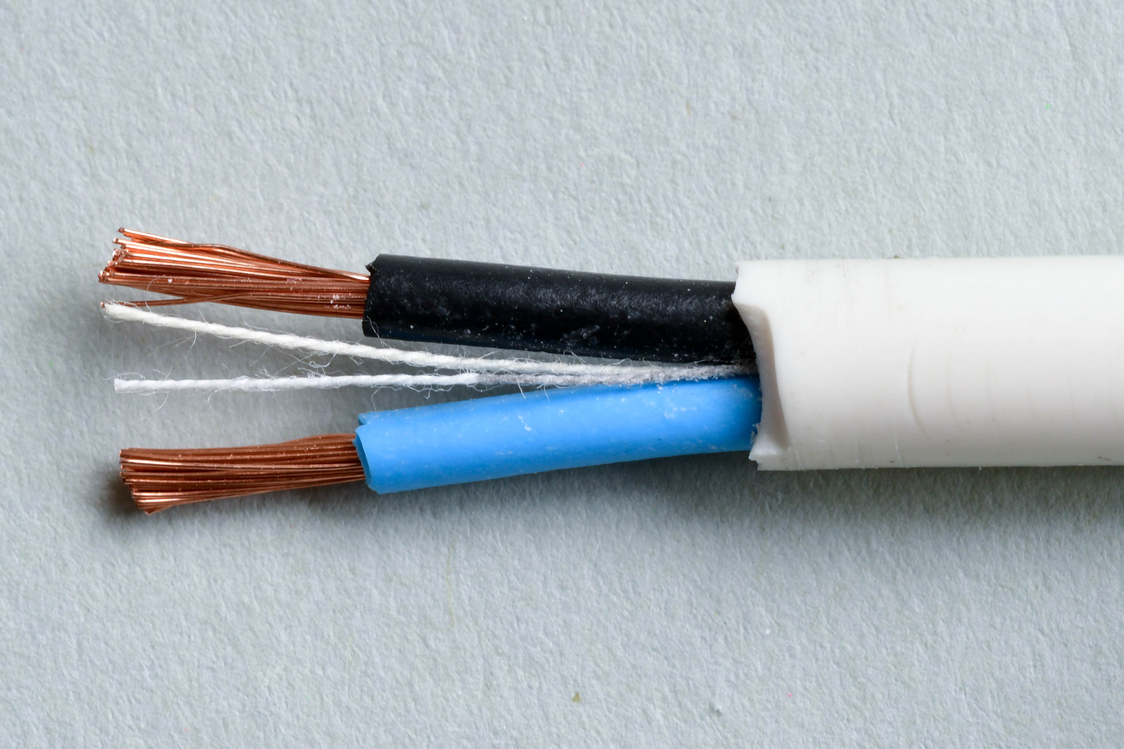 Kendraden in een elektrische leiding